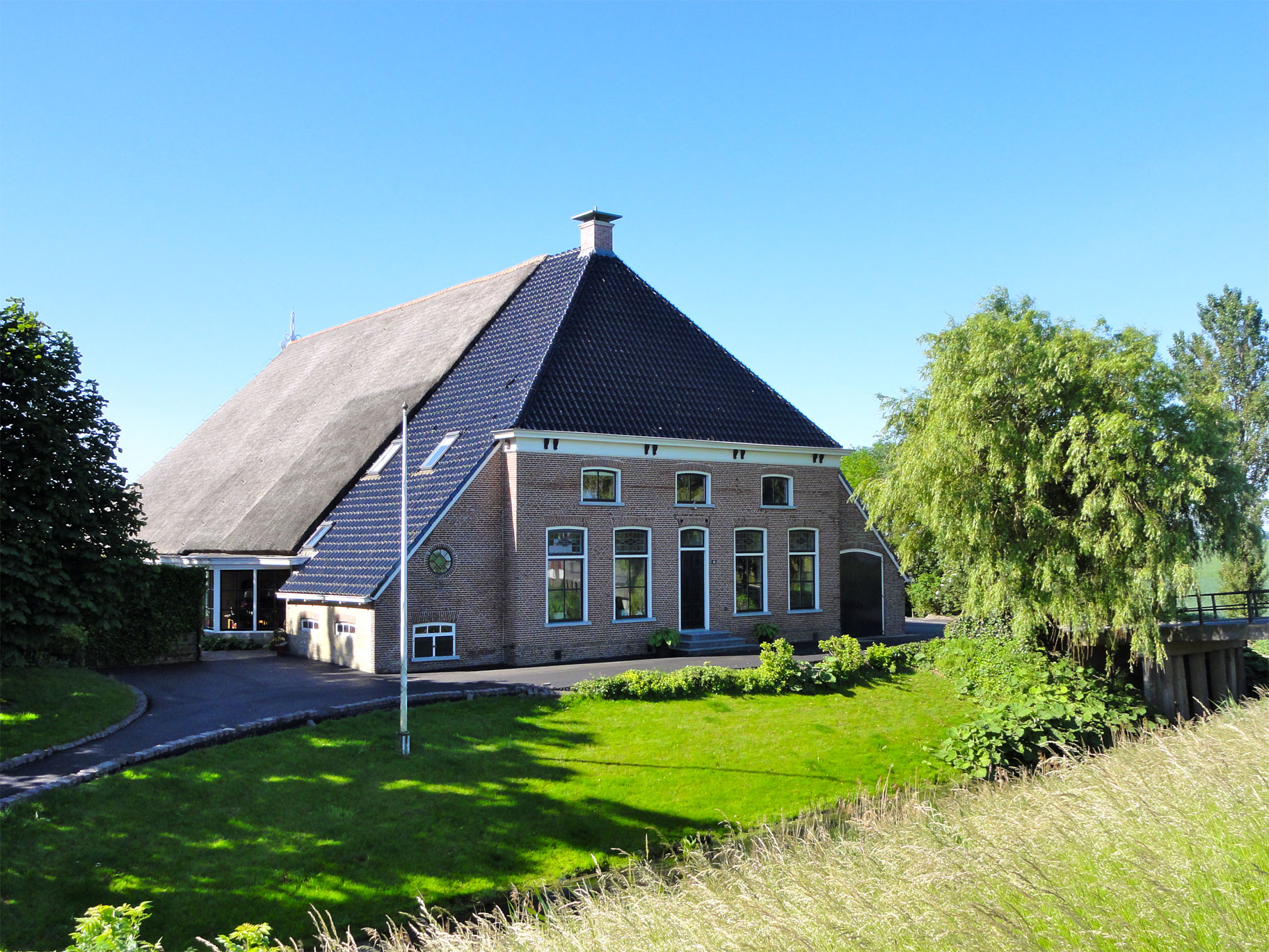 Oudebildtdijk 331 in Sint-Annaparochie